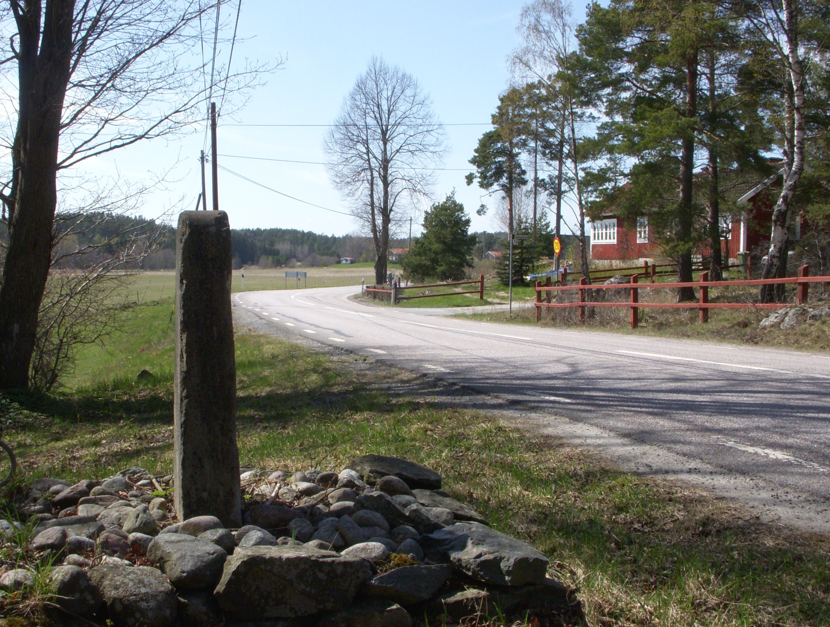 Dalarövägen och milstolpe (1/4 mil) vid Solbacken